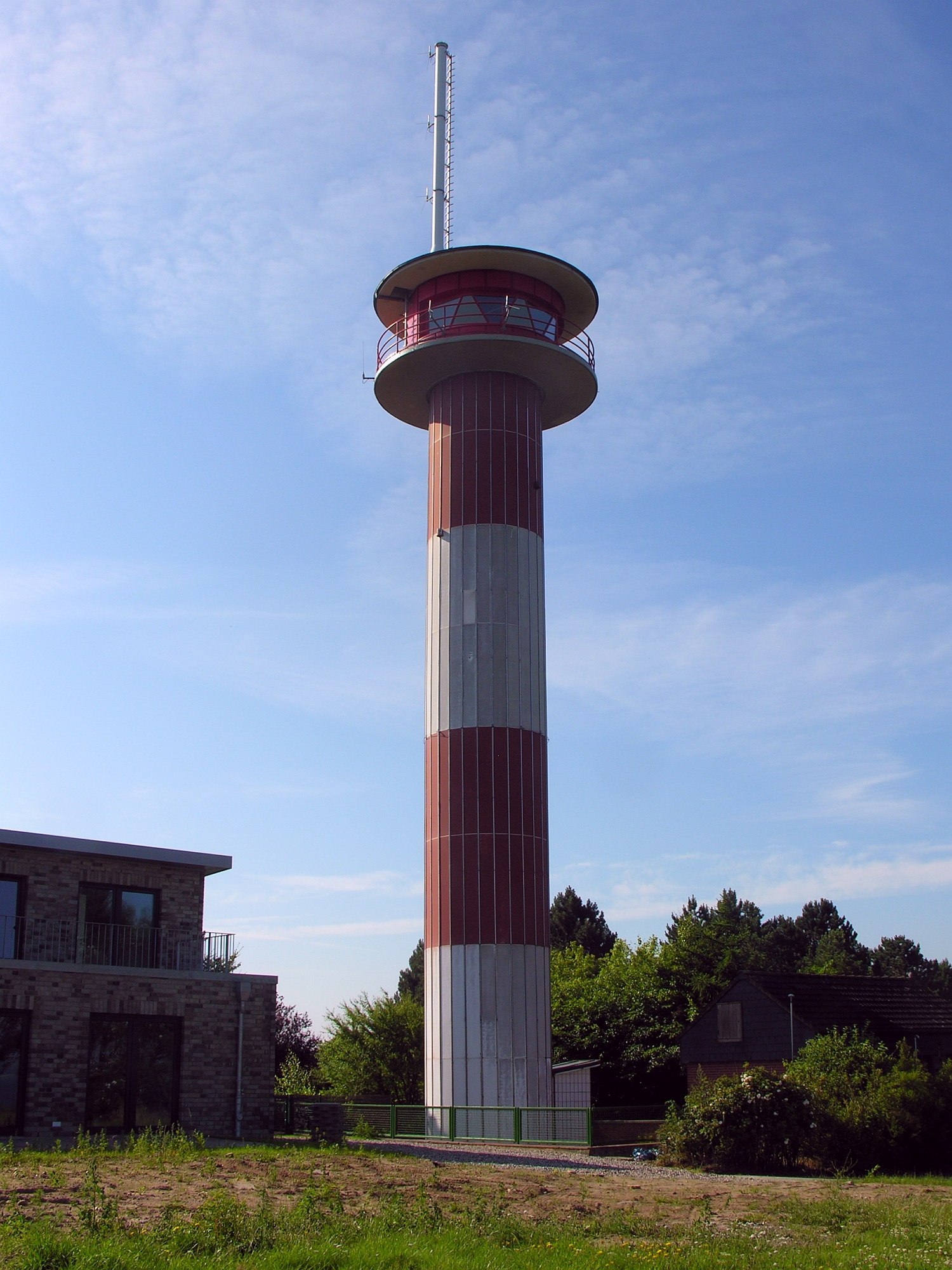 Leuchtturm Holnis (Standort am östl. Ende des Ortes Schausende bei Glücksburg an der Flensburger Förde (Innenförde) Ostsee Lighthouse in Germany Foto Wolfgang Pehlemann Steinberg DSCN0291